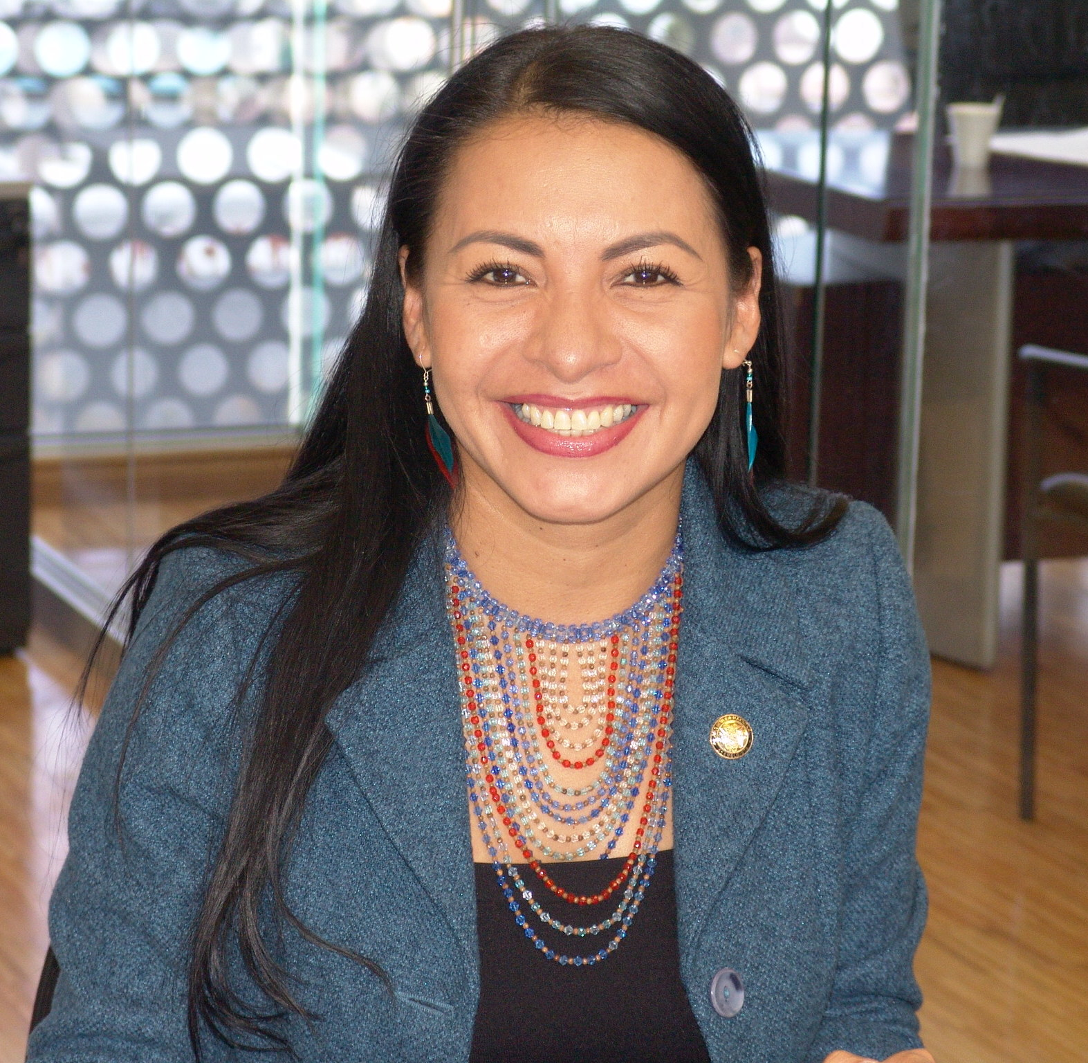 26 de agosto